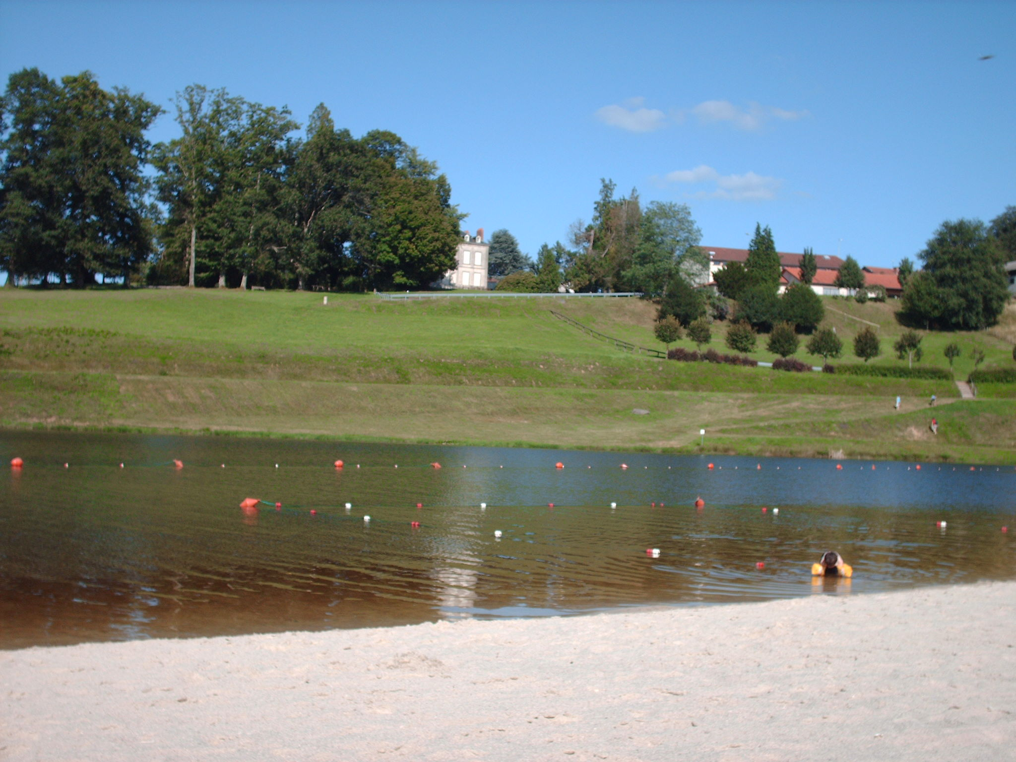 Lac de Saint-Martin-Terressus en Haute-Vienne (87)